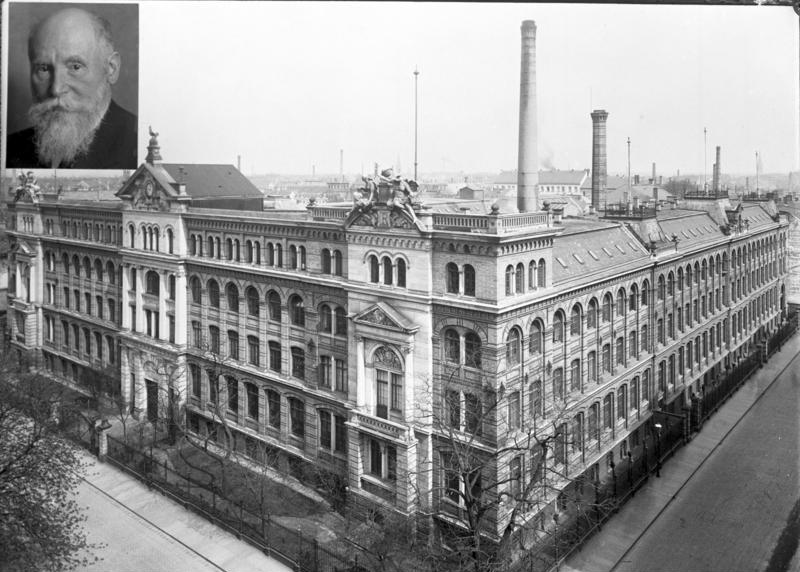 Der weltbekannte Verlag der Universal-Bibliothek Philipp Reclam jr. Leipzig , begeht am 1. Oktober d. J. die Feier seines 100jährigen Bestehens. Übersicht des Geschäftshauses der Firma Philipp Reclam mit dem Mitbegründer , dem Geh. Kommerzienrat Hans Heinrich Reclam.